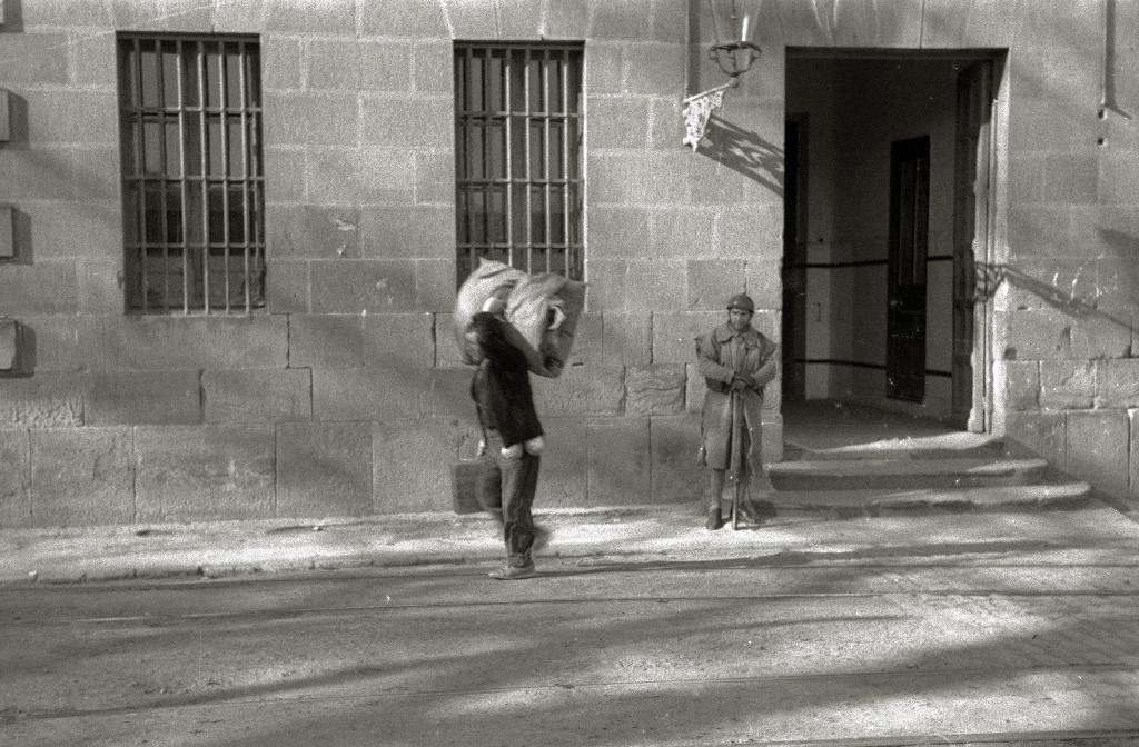 Título original: Salida de presos de la cárcel de Ondarreta (4/5) Localización: San Sebastián (Guipúzcoa)